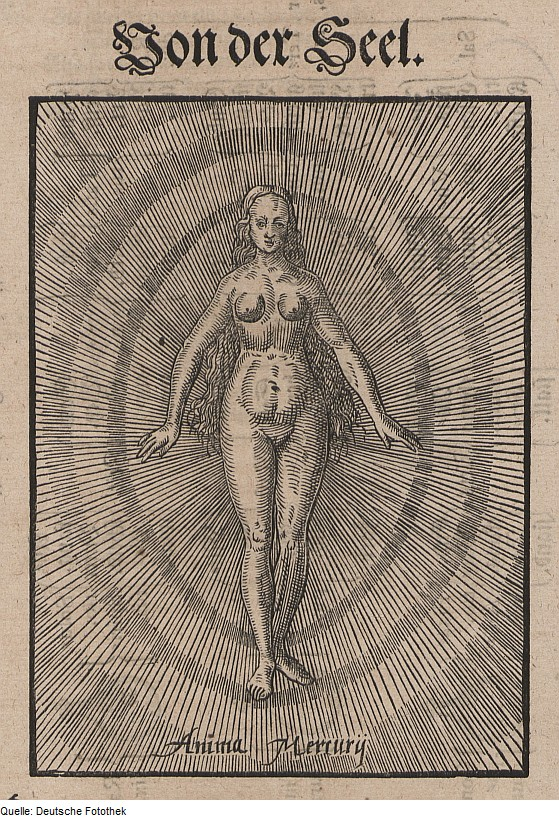 Original image description from the Deutsche FotothekTheosophie & Alchemie